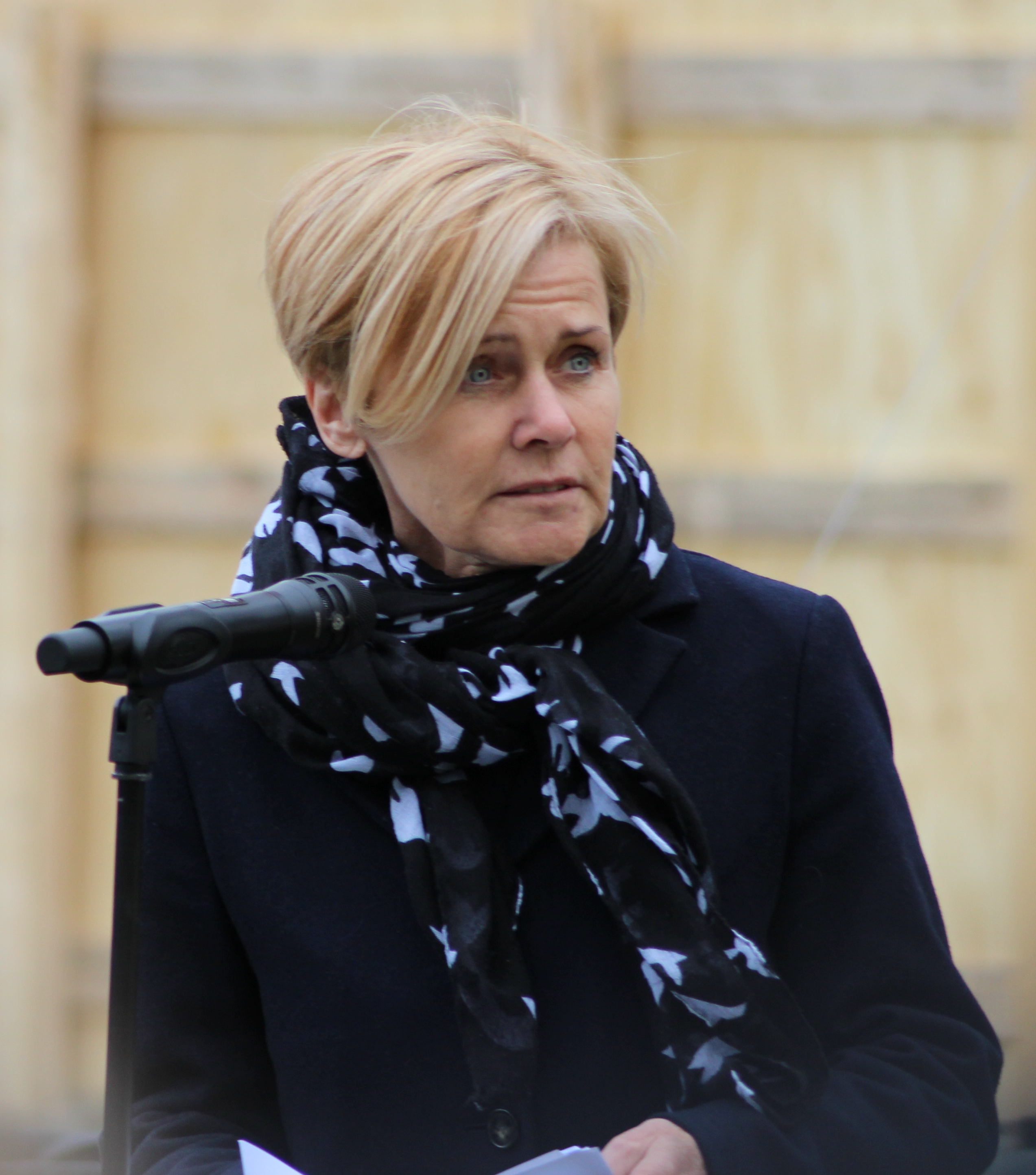 Mette Bock ved første spadestik til Frihedsmuseet den 4. maj 2017.